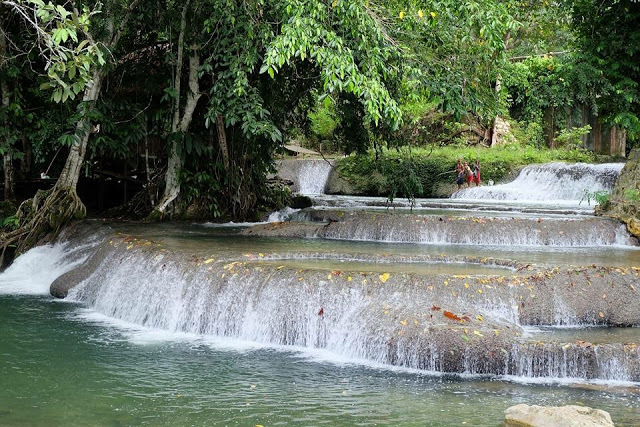 Air Terjun Ubadari di Distrik Kramomongga Kabupaten Fakfak, Papua Barat Indonesia